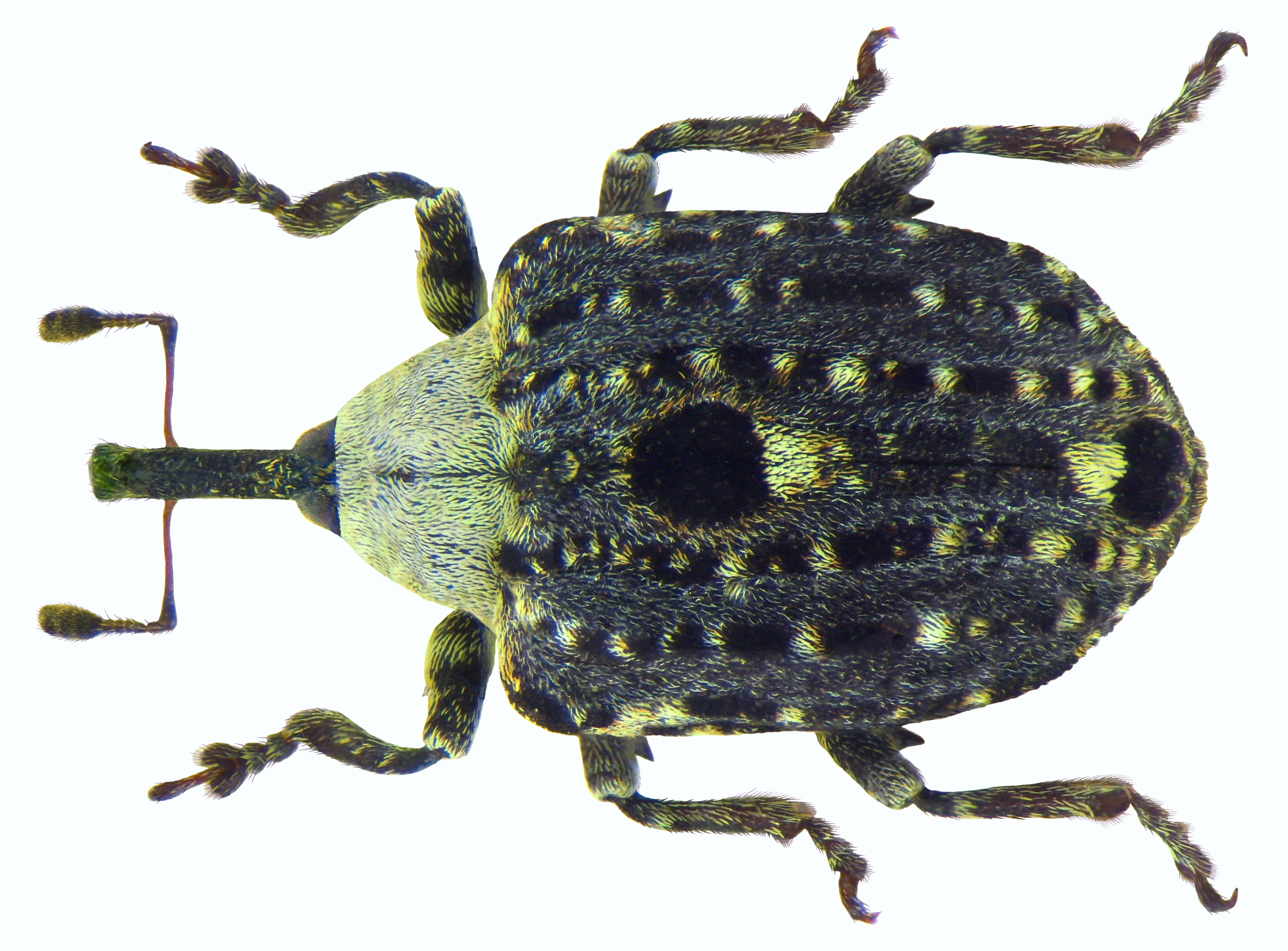 Familie: Curculionidae Groesse: 5,0 mm (4,5-5 mm) Verbreitung: Sibirien über Kleinasien bis Europa Oekologie: auf Scrophularia-Arten, selten auf Verbascum und Budleyia Fundort: Germania, Baden Württemberg, Lauda, Buch am Ahorn leg. H.J.Mager, 14.V.1977; det. U.Schmidt, 1984 Photo: U.Schmidt, 2012